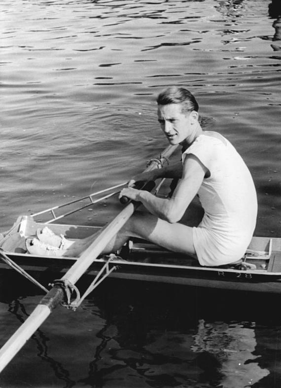 Klaus Filter Zentralbild Funck 18.7.1955 DDR-Rudermeisterschaften 1955 in Grünau Am 17. Juli 1955 fand auf dem Olympiakurs in Berlin-Grünau die DDR-Meisterschaft 1955 unserer Ruderinnen und Ruderer statt. In fast allen Kämpfen gab es packende Positionskämpfe. UBz: Im Leichtgewichts-Einer erkämpfte sich Klaus Filter (SC Dynamo) den Titel.